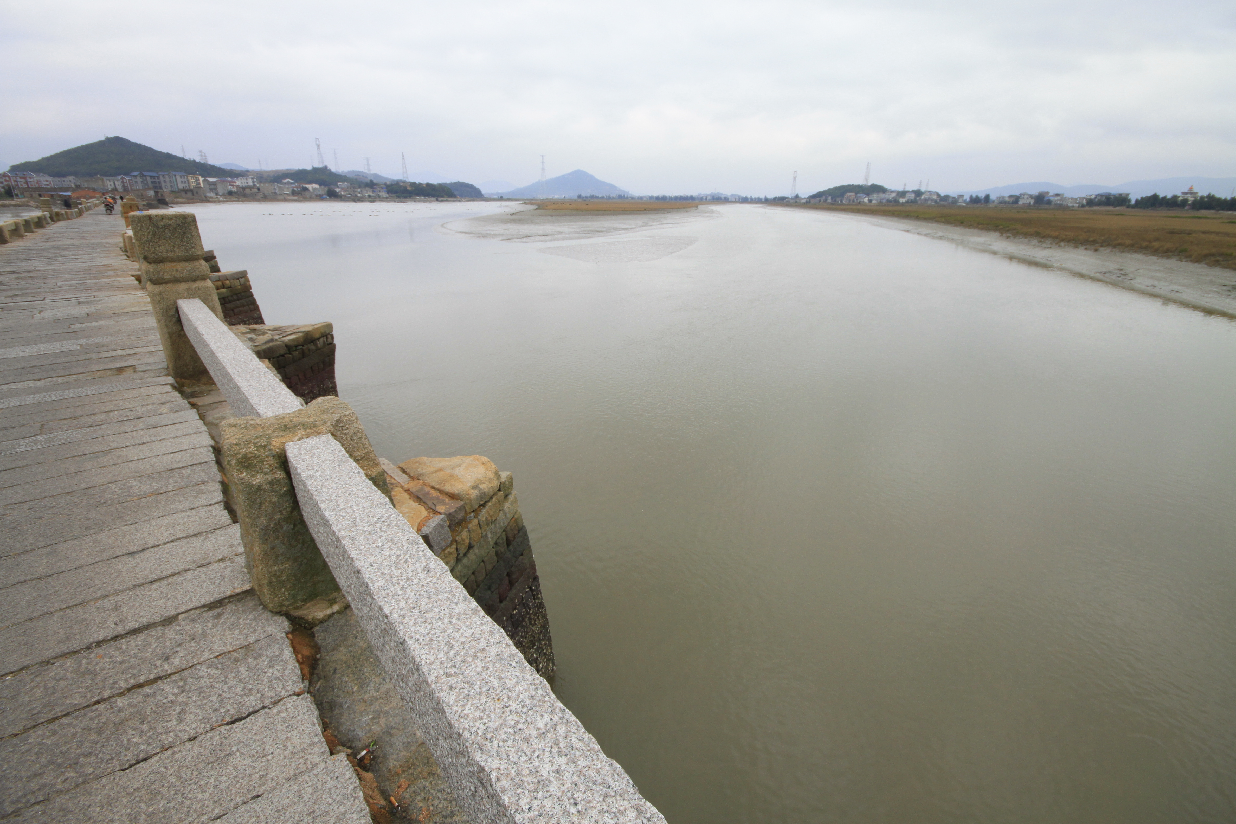 龙江桥，位于中国福建省福清市，是福建省文物保护单位。